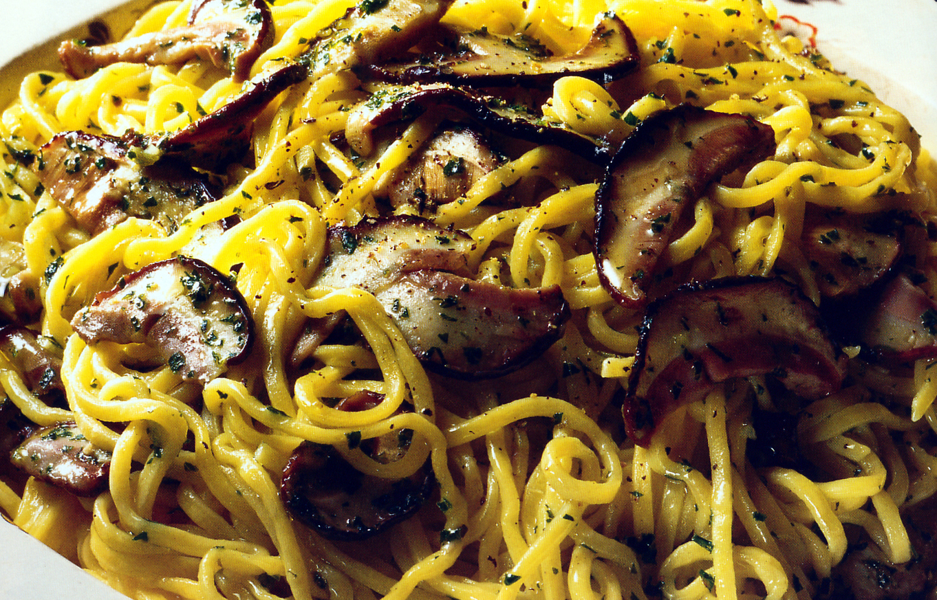 tagliolini Pciarl